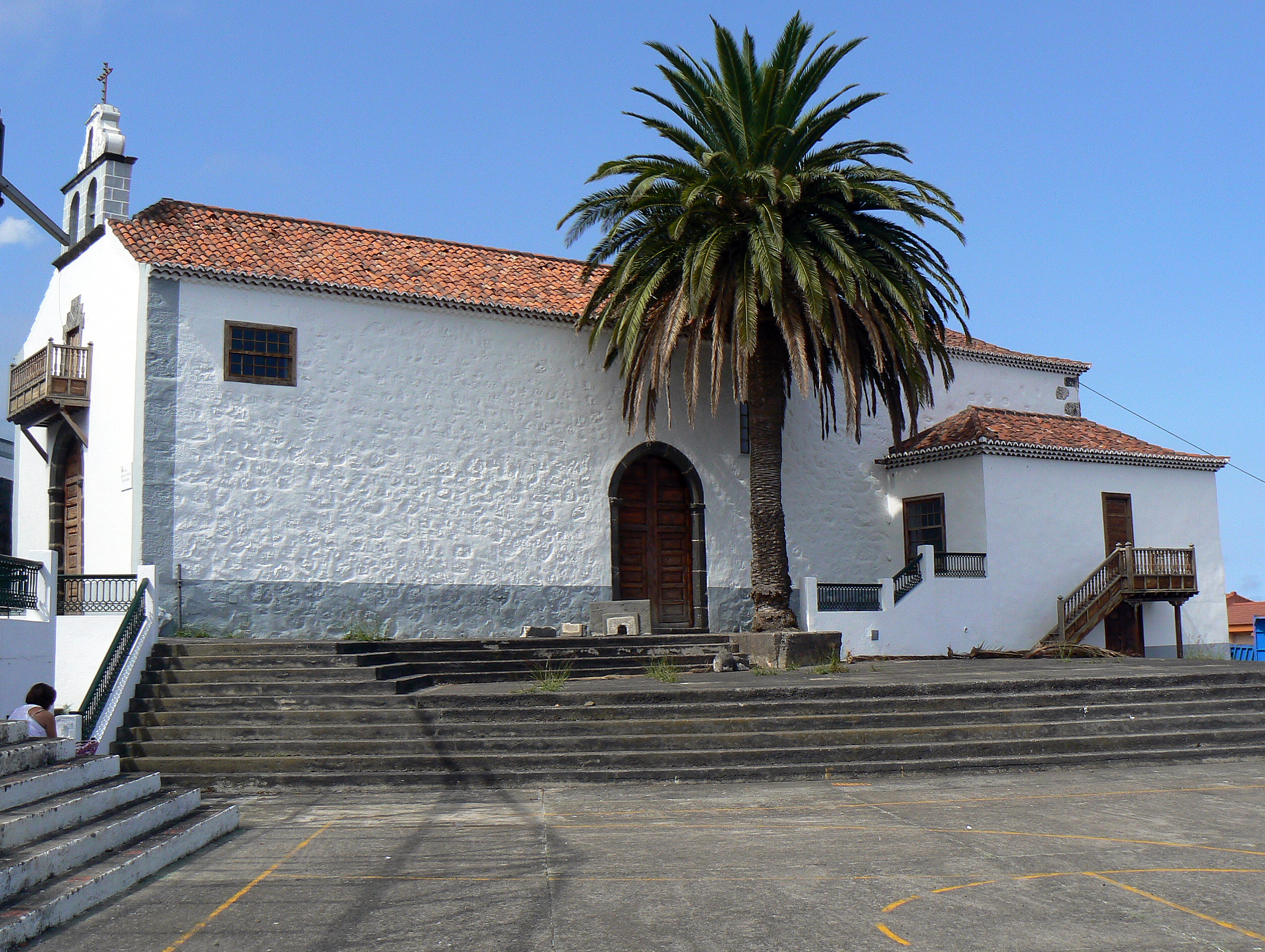 Lato destro con la sacrestia della chiesa di San José, Breña Baja, La Palma, Canarie